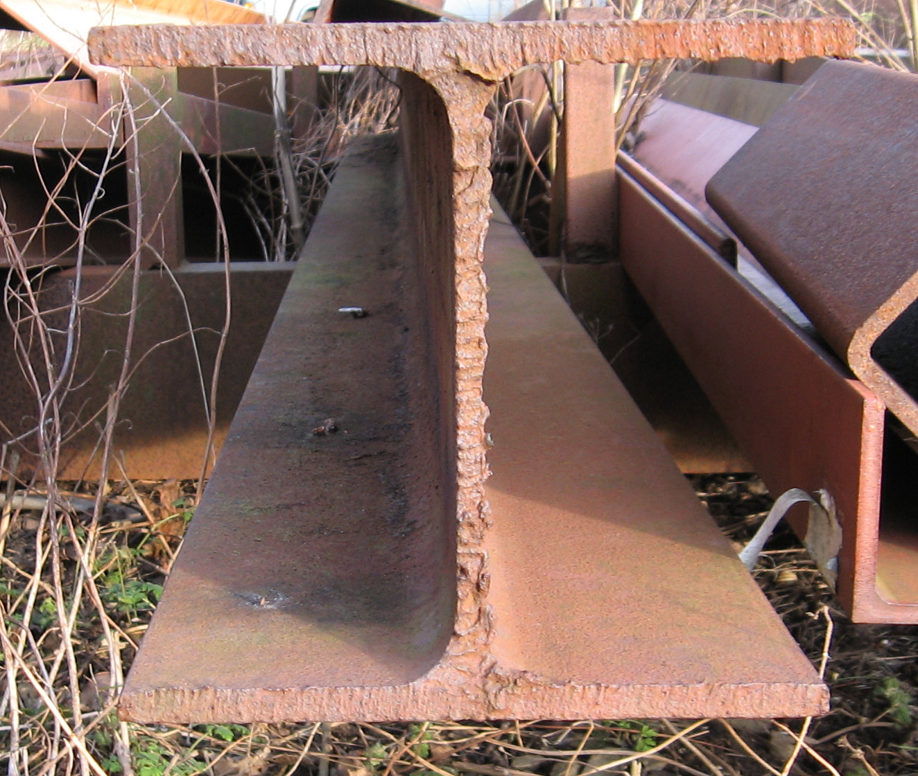 H-profil kapad med skärbrännare